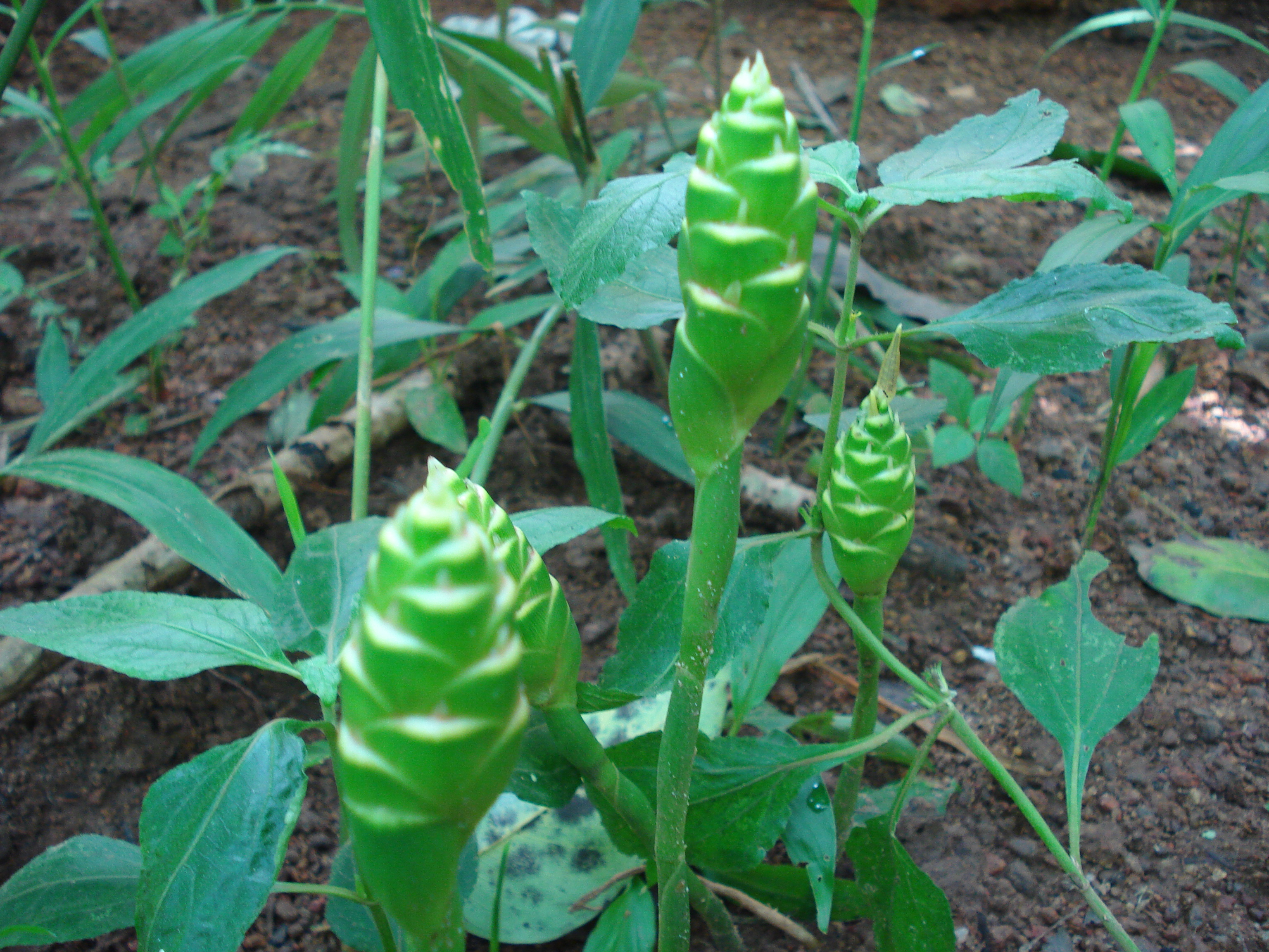 ഇഞ്ചിപ്പൂവ്